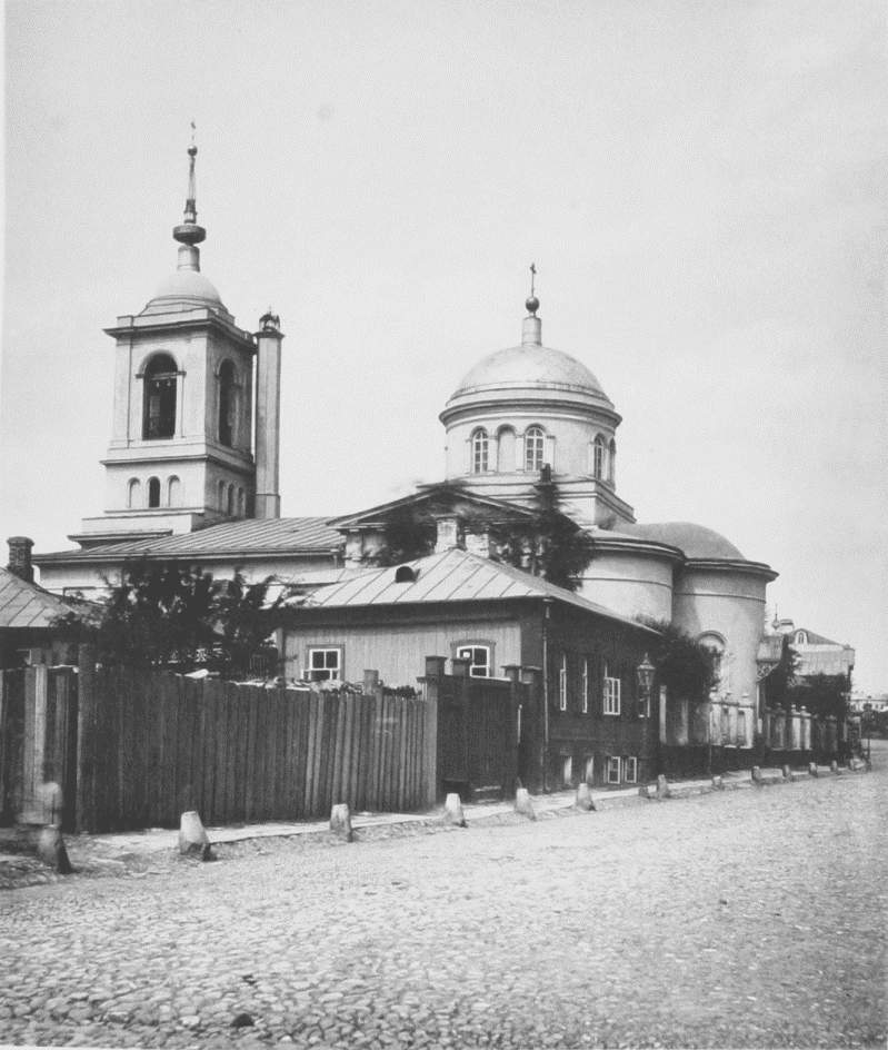 Храм святых Афанасия и Кирилла, патриархов Александрийских, на Сивцевом Вражке